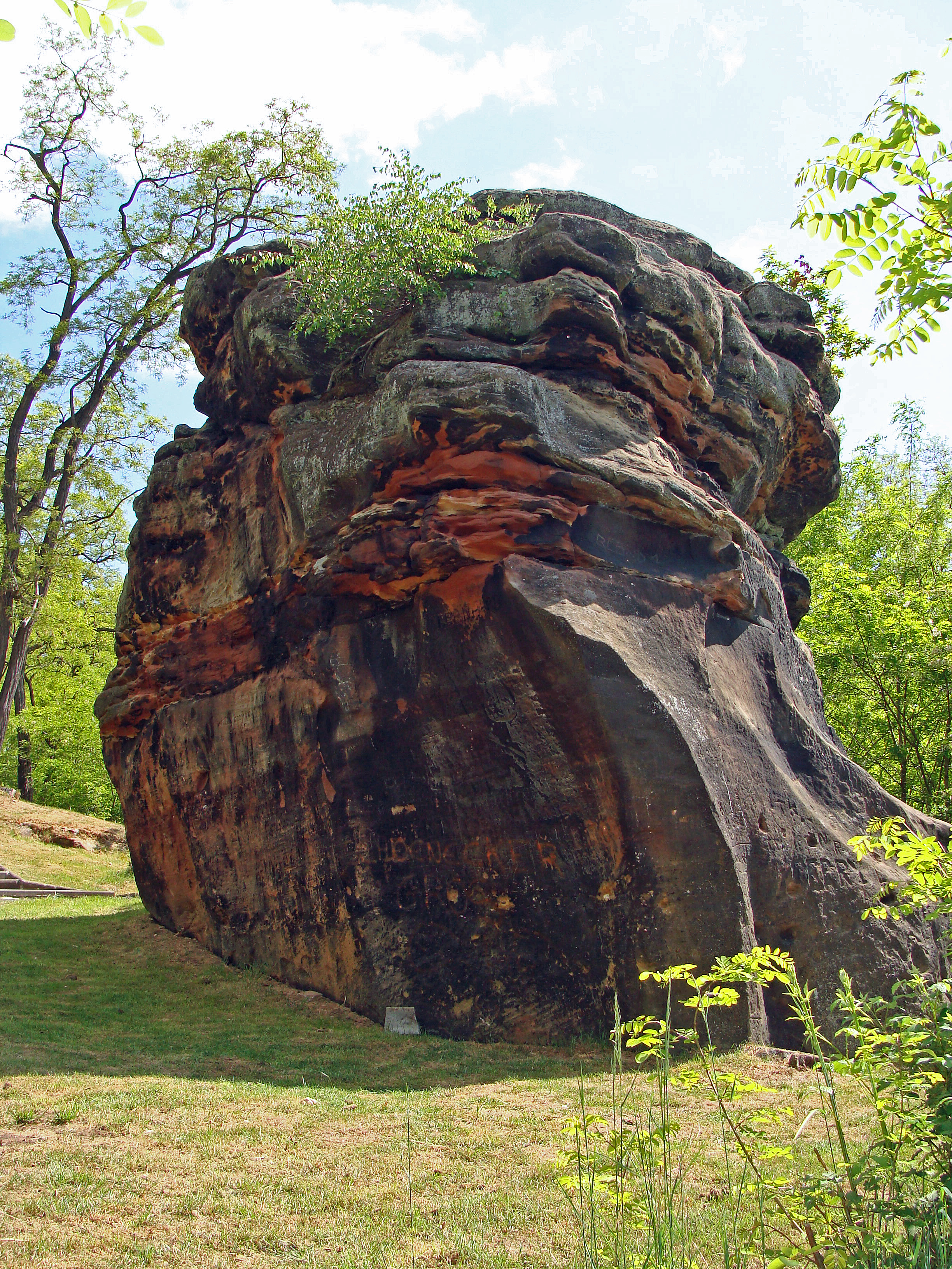 Le "Wieselstein" de Freyming-Merlebach est un mégalithe assimilé à un menhir, entouré d'un halo de légendes, de six mètres de haut et de quatre mètres de large. Ce rocher druidique a également servi de borne dès l'époque gallo-romaine. Il est situé entre la cité Cuvelette et le puits Reumaux de Freyming-Merlebach (Moselle).